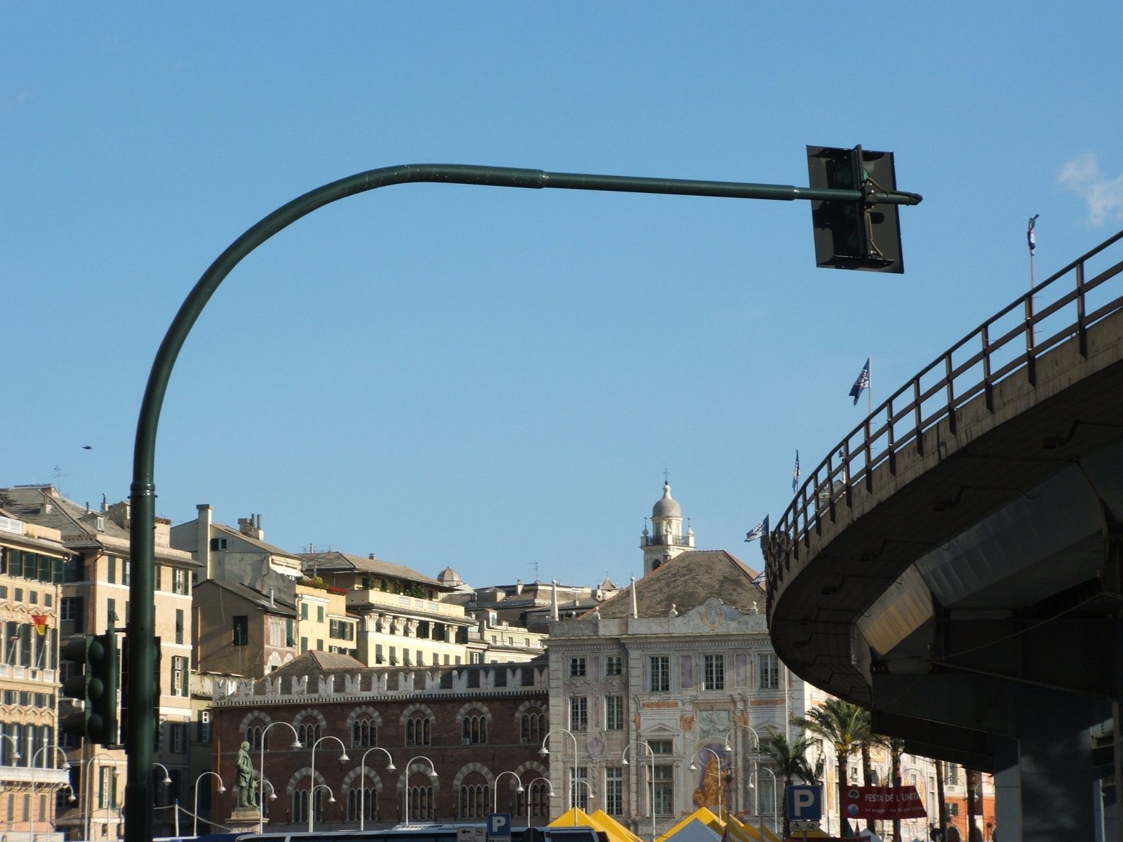 Genova - Piazza Caricamento - Palazzo San Giorgio e strada sopraelevata.